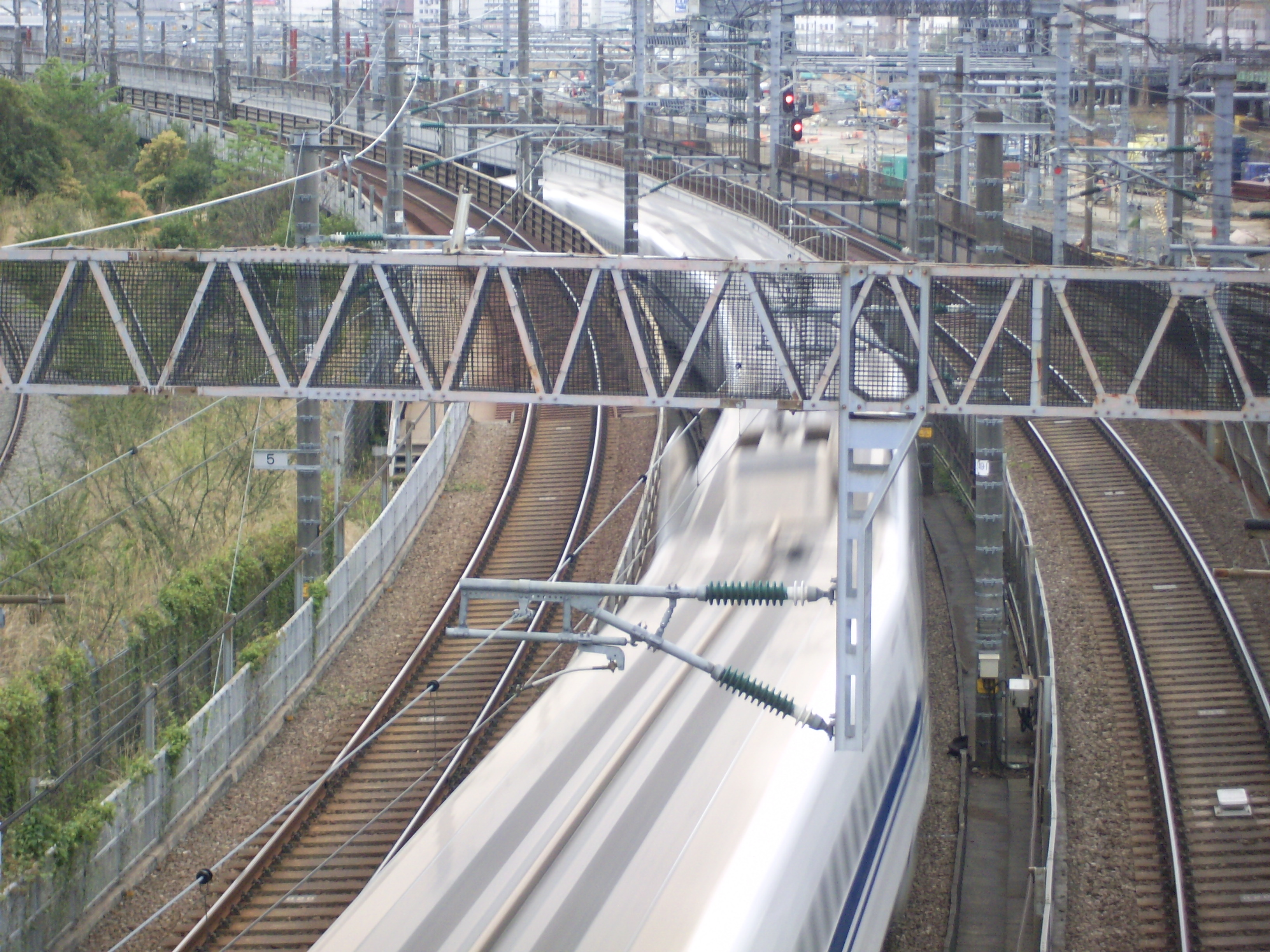 東海道新幹線大井車両基地引き込み線：田町駅近くの札ノ辻橋下で本線と分岐・合流（走行中の車両は本線） ㊟カメラを起動すると日付機能が出荷時のものに初期化されるため、ファイル履歴の撮影日時とメタデータの原画像データの生成日時が異なります